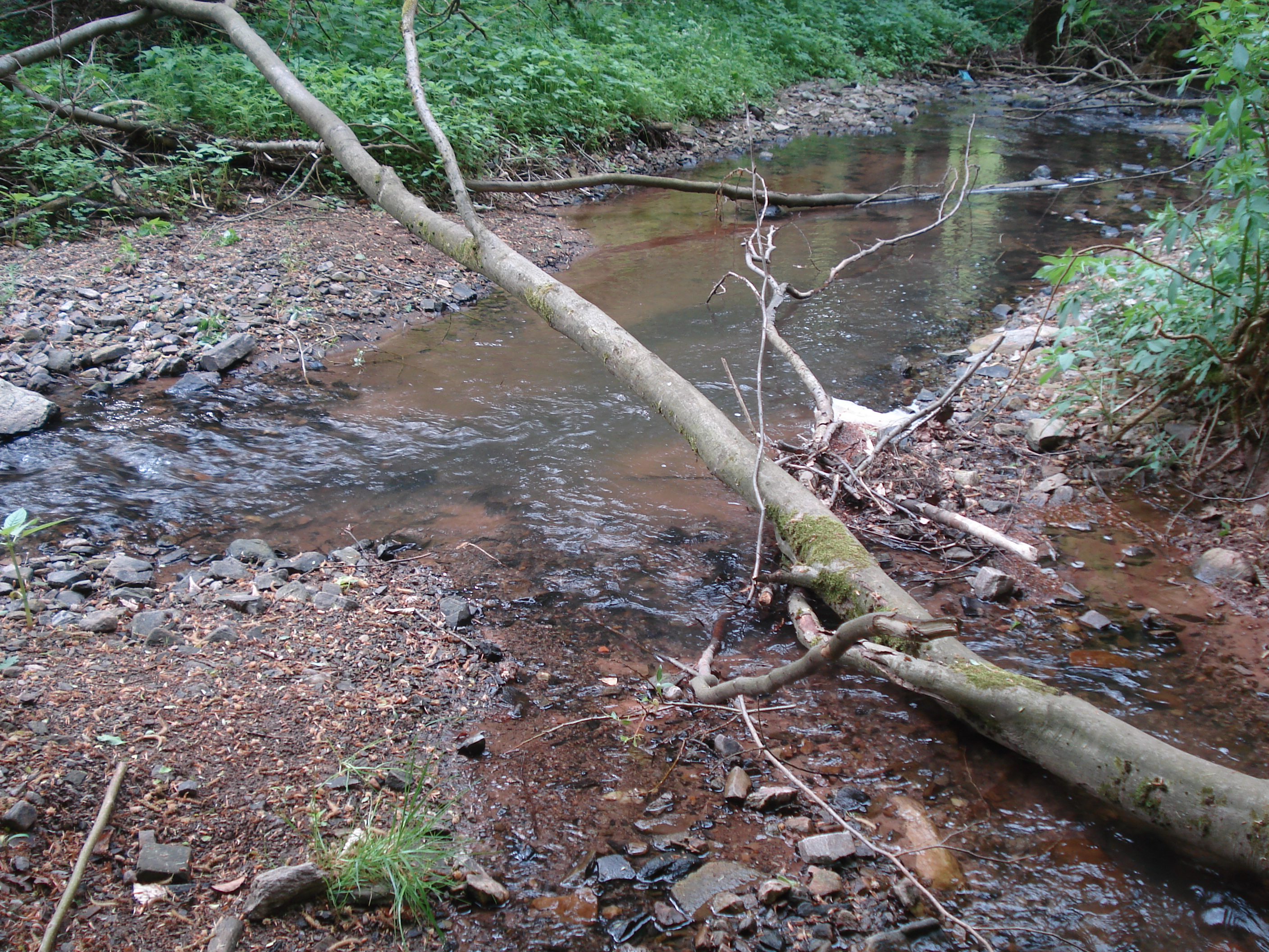 Der Omersbach (links) mündet in den Geiselbach (rechts)